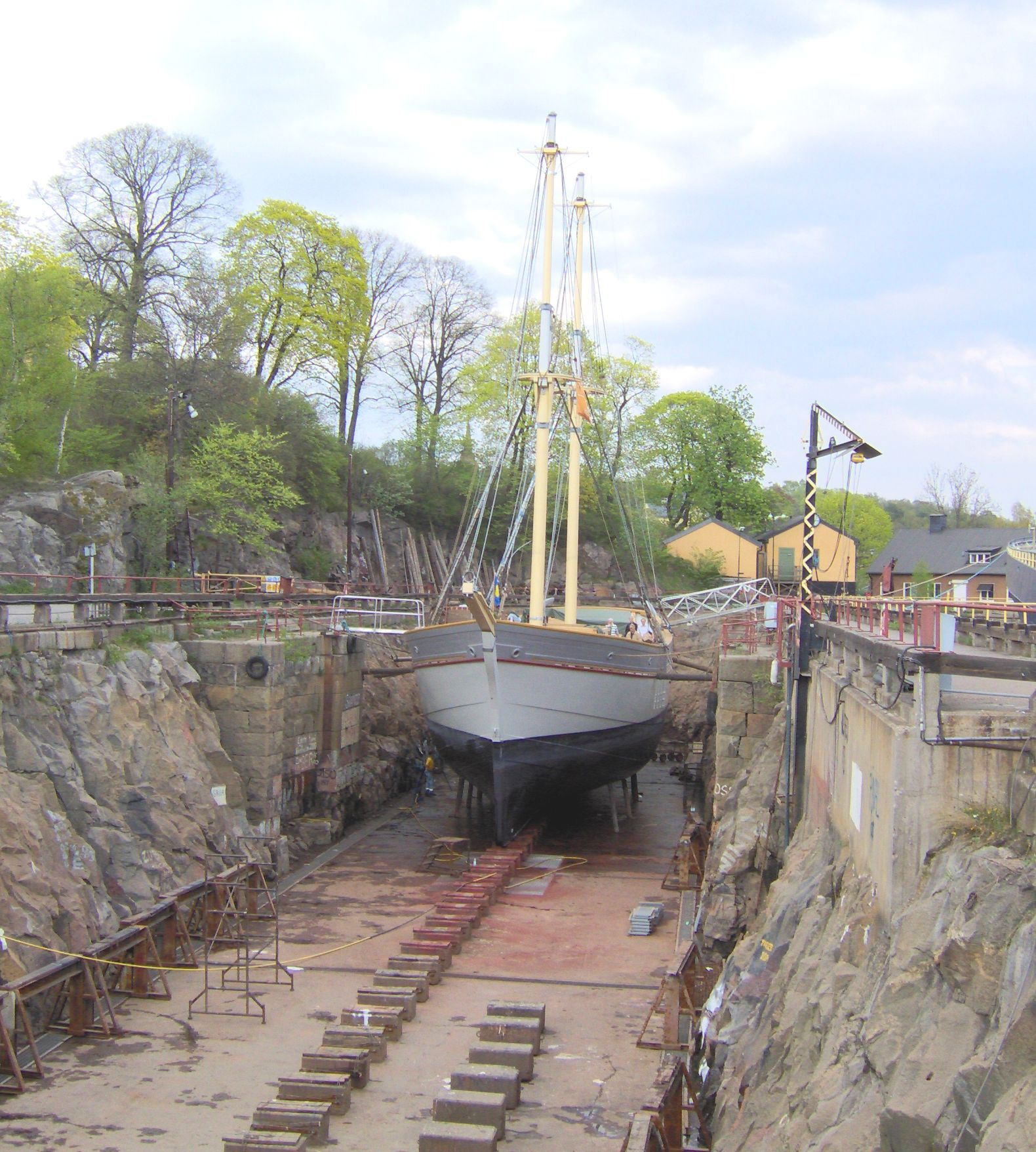 Briggen Tre Kronor af Stockholm i Beckholmsdockan på Beckholmen i Stockholm The brig Tre Kronor af Stockholm in dry dock at Beckholmen in Stockholm, Sweden.